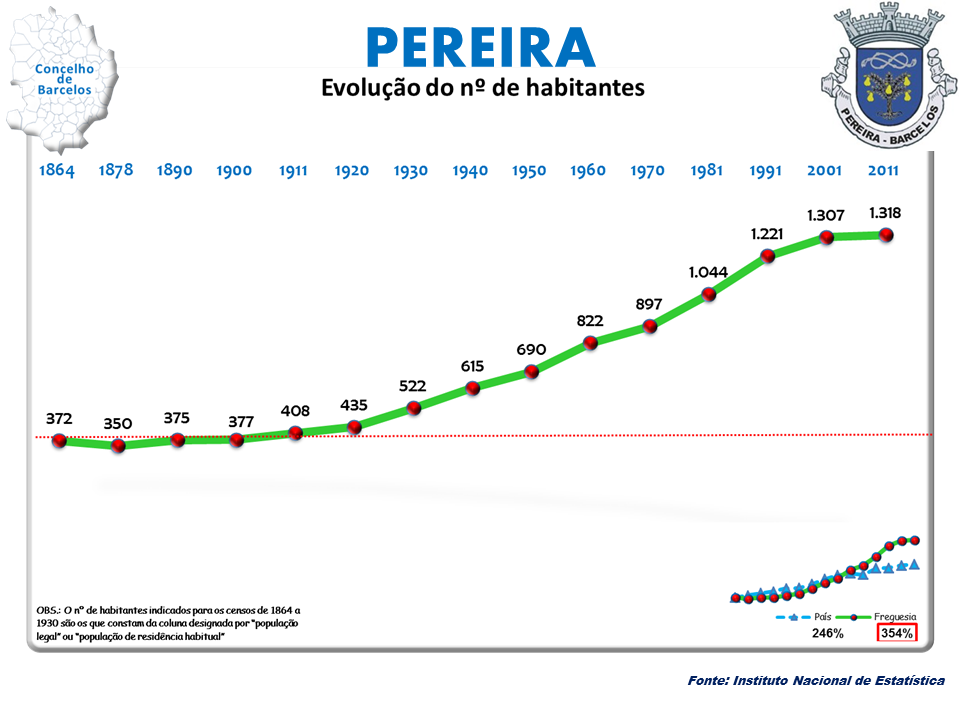 Censo 1864/2011